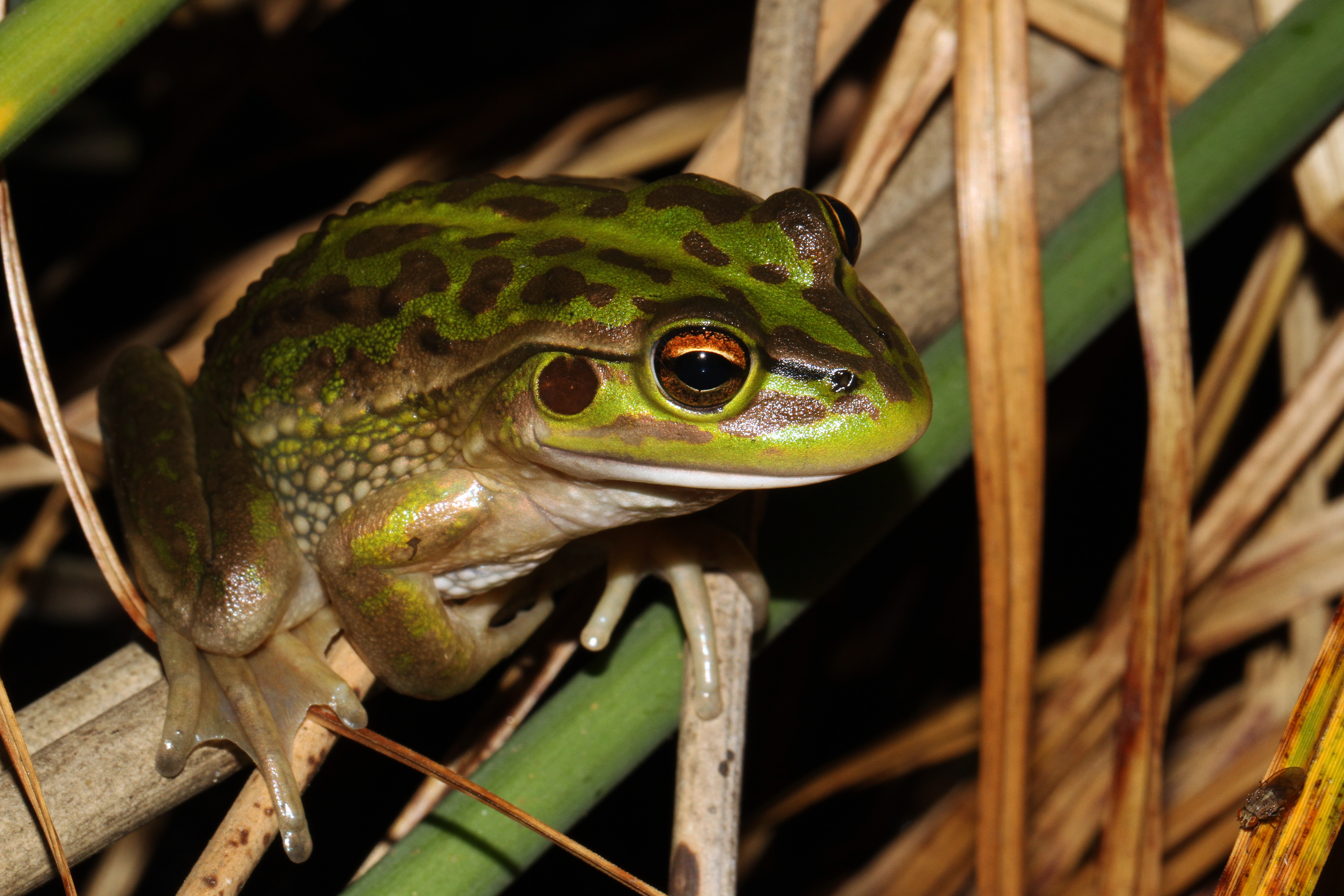 Melbourne, Vic.